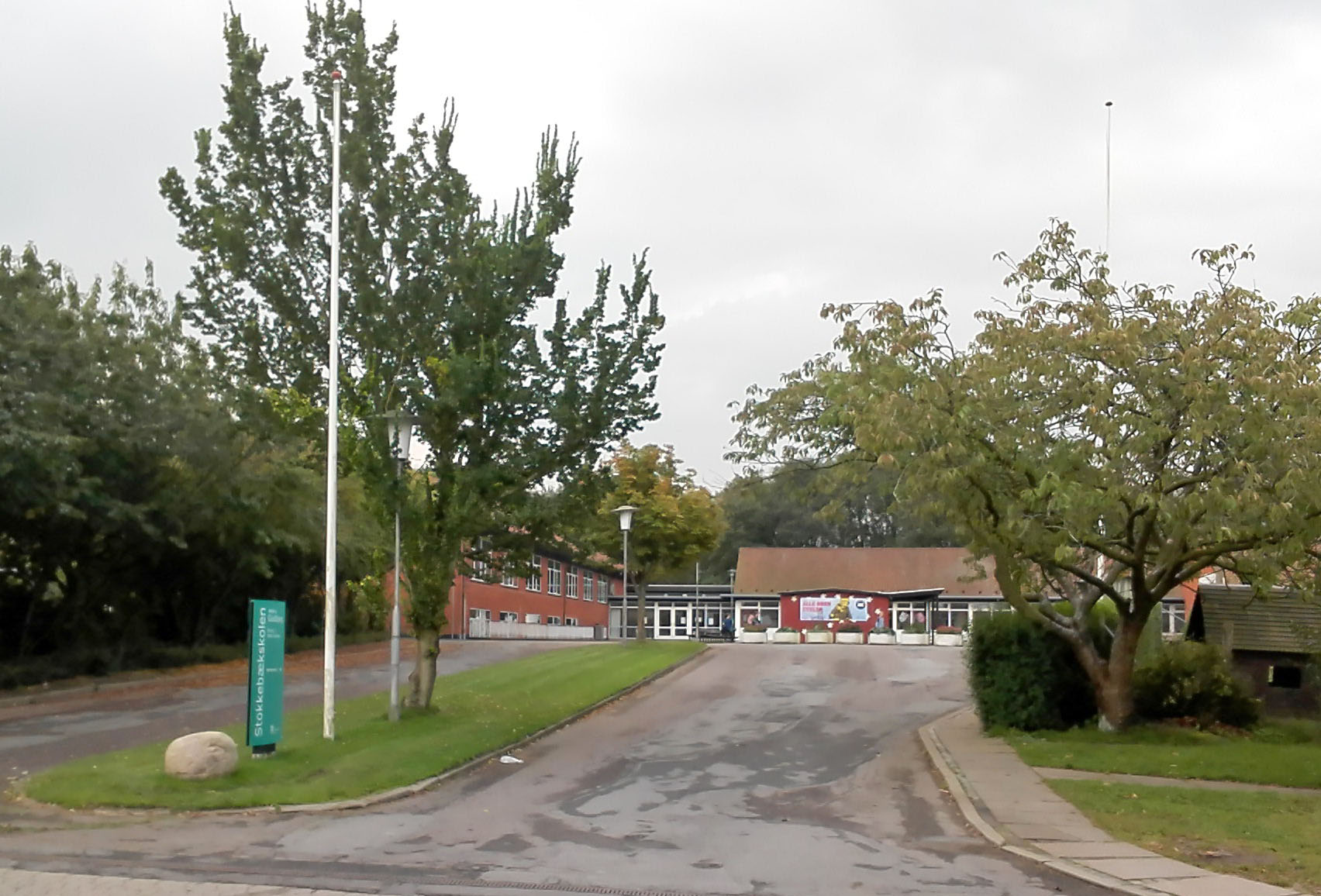 Stokkebækskolens afdeling i Gudbjerg